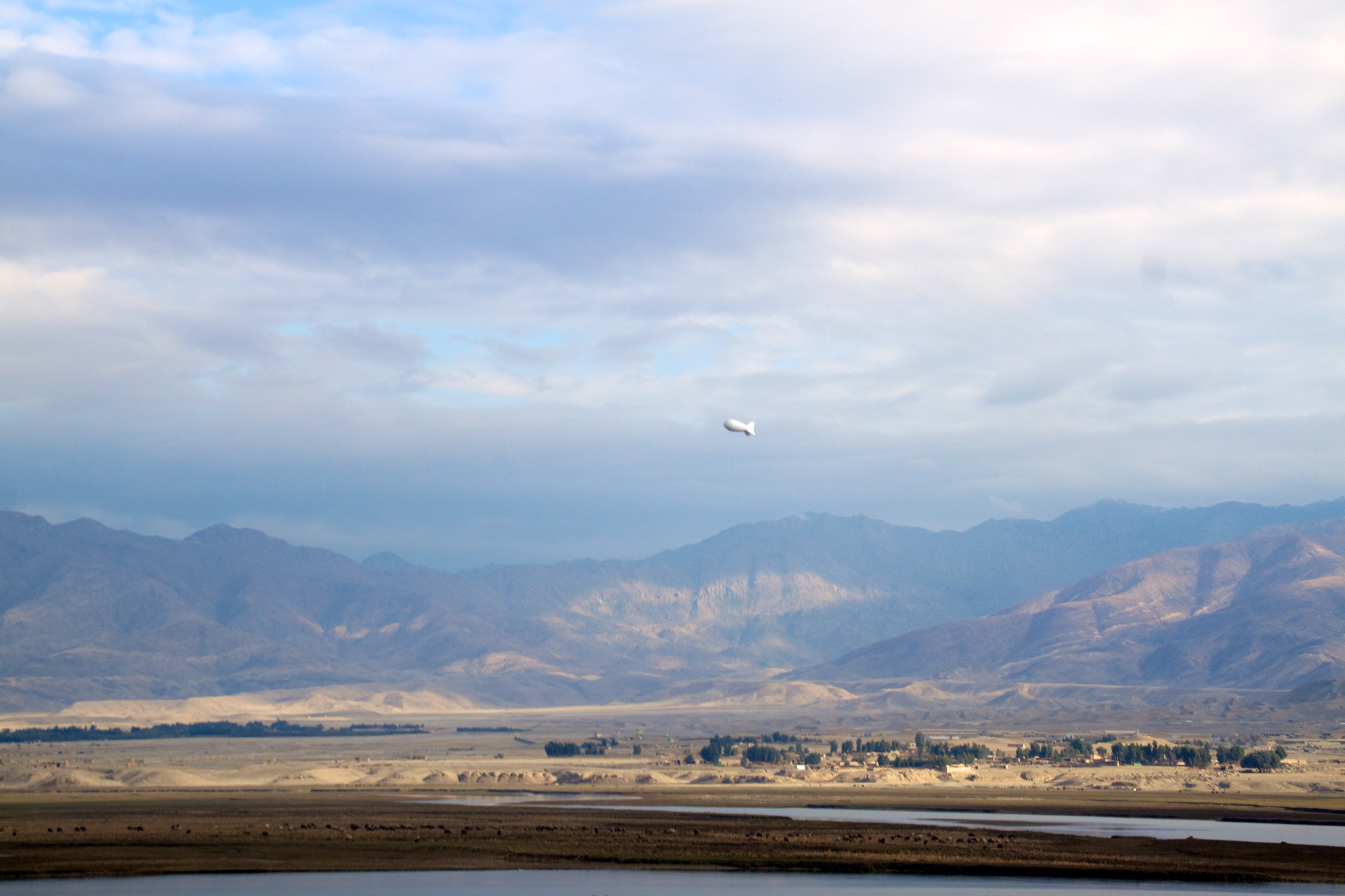 Blimp over Nangarhar.